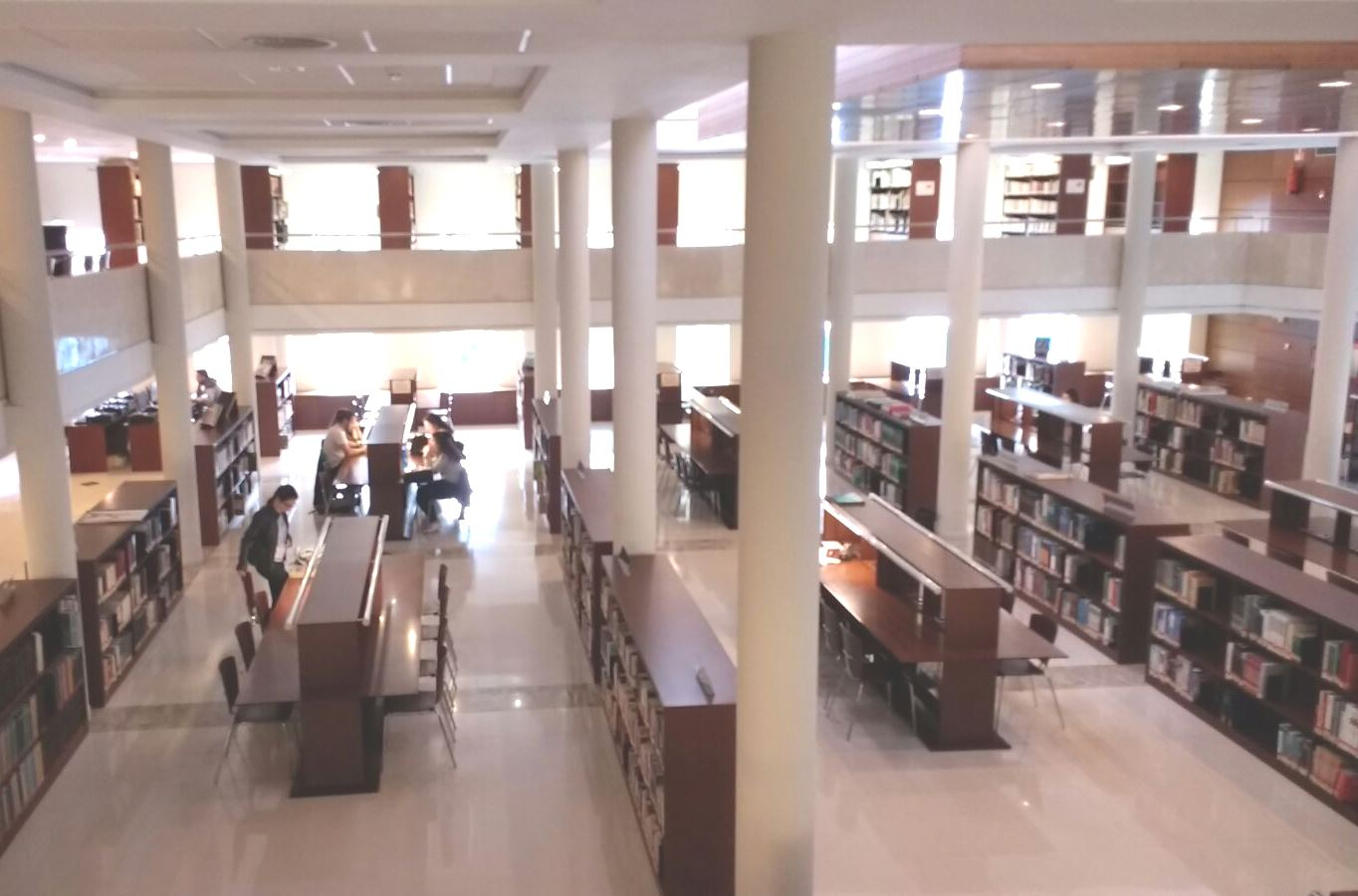 Sala de consulta de la Biblioteca Pública da Coruña Miguel González Garcés